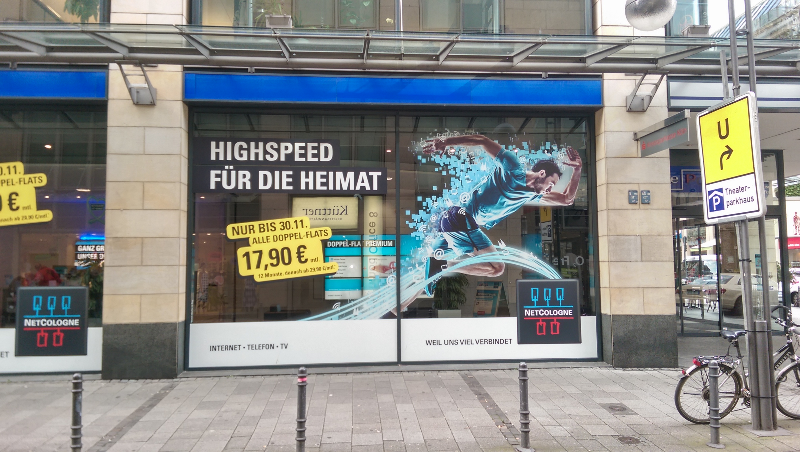 Netcologne Laden in Köln